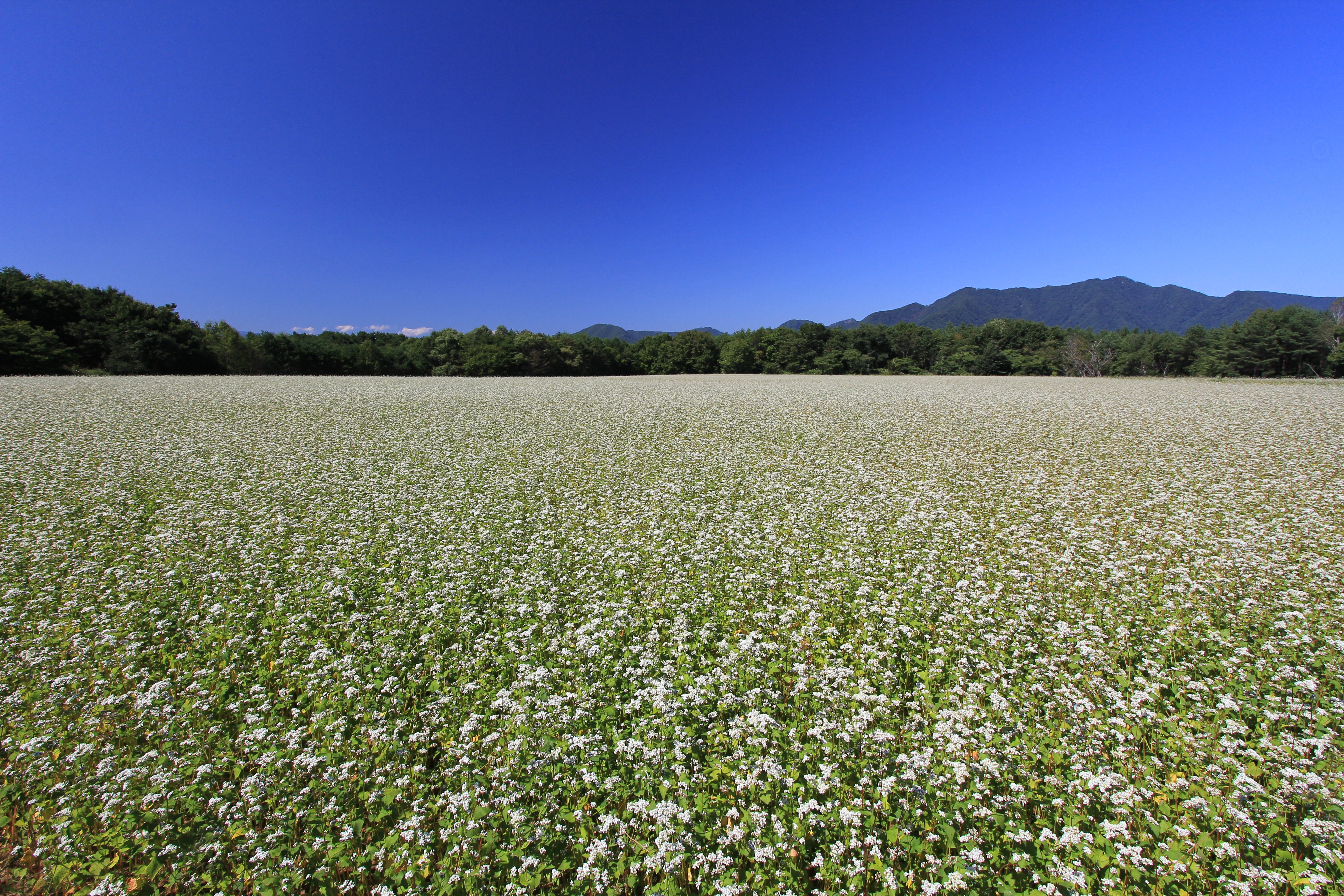 福島県下郷町、猿楽台地のそば畑